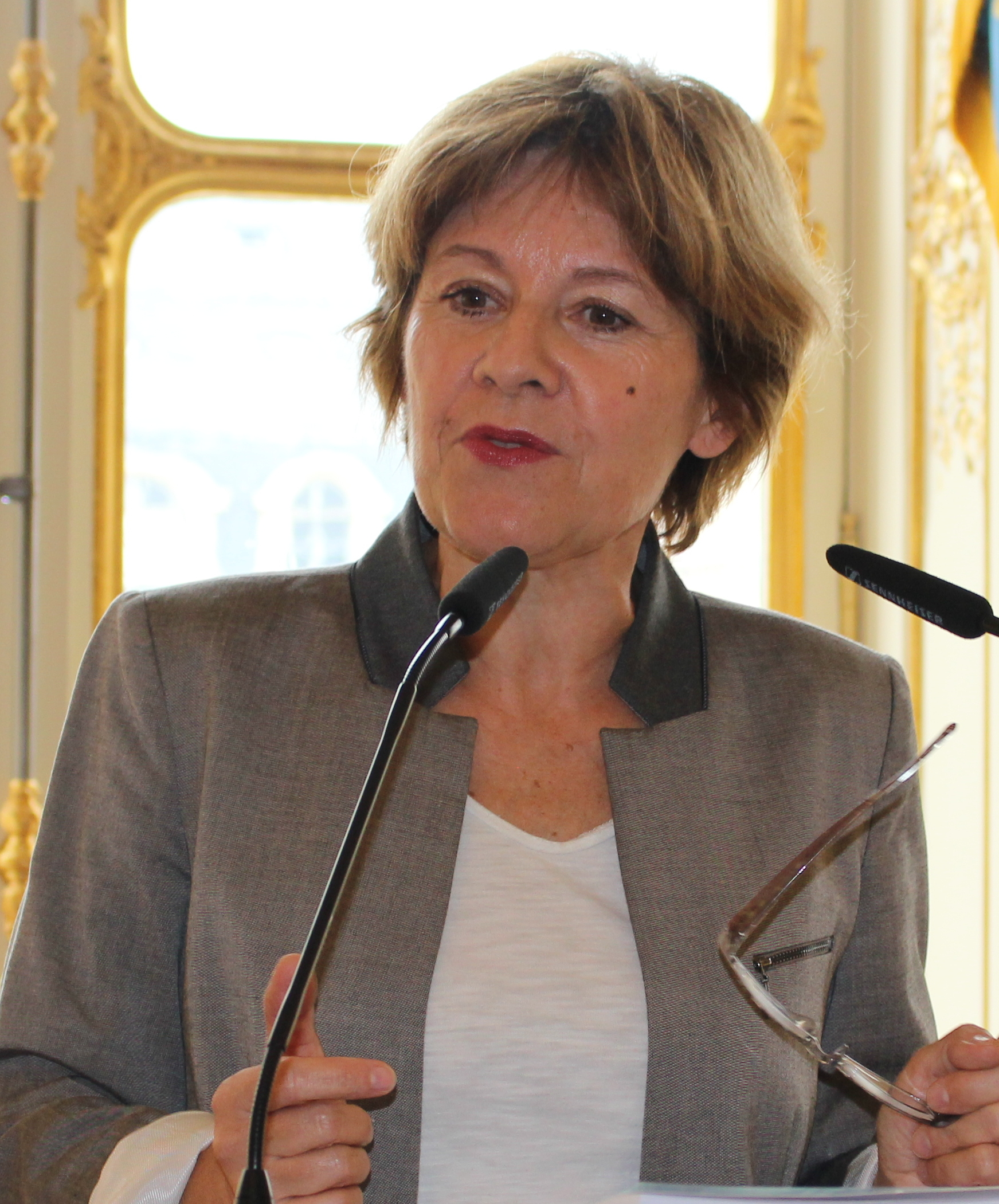 Sylvie Robert, sénatrice d'Ille-et-Vilaine (Bretagne) - Remise du rapport sur l'extension des horaires d'ouverture des bibliothèques